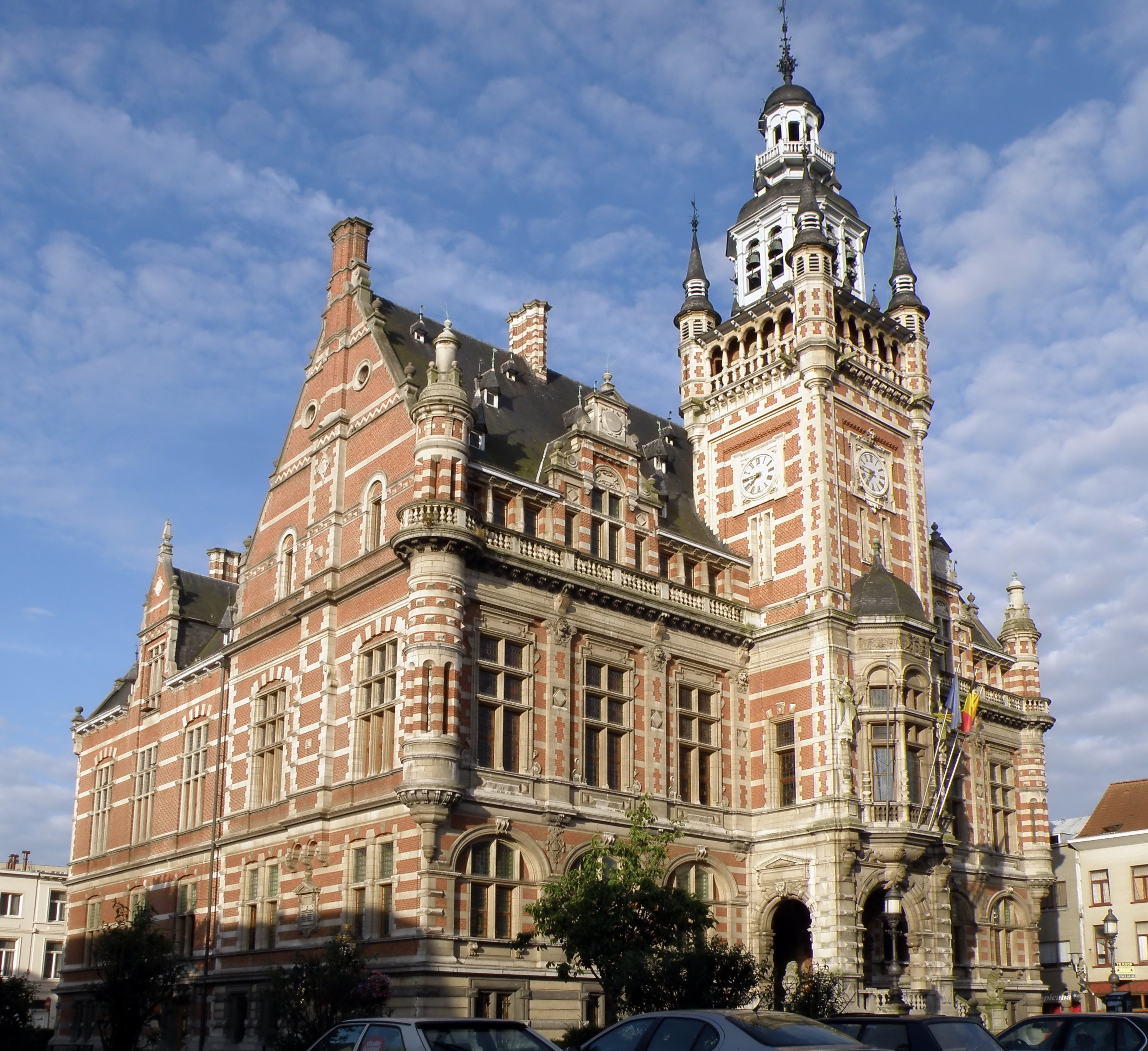 Antwerpen, distr. Borgerhout. Districtshuis (voorm. gemeentehuis) in Vlaamse neo-renaissance, gebouwd 1886-1889, n.o.v. arch. Leonard & Henri Blomme.